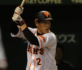 ジャイアンツ井端選手